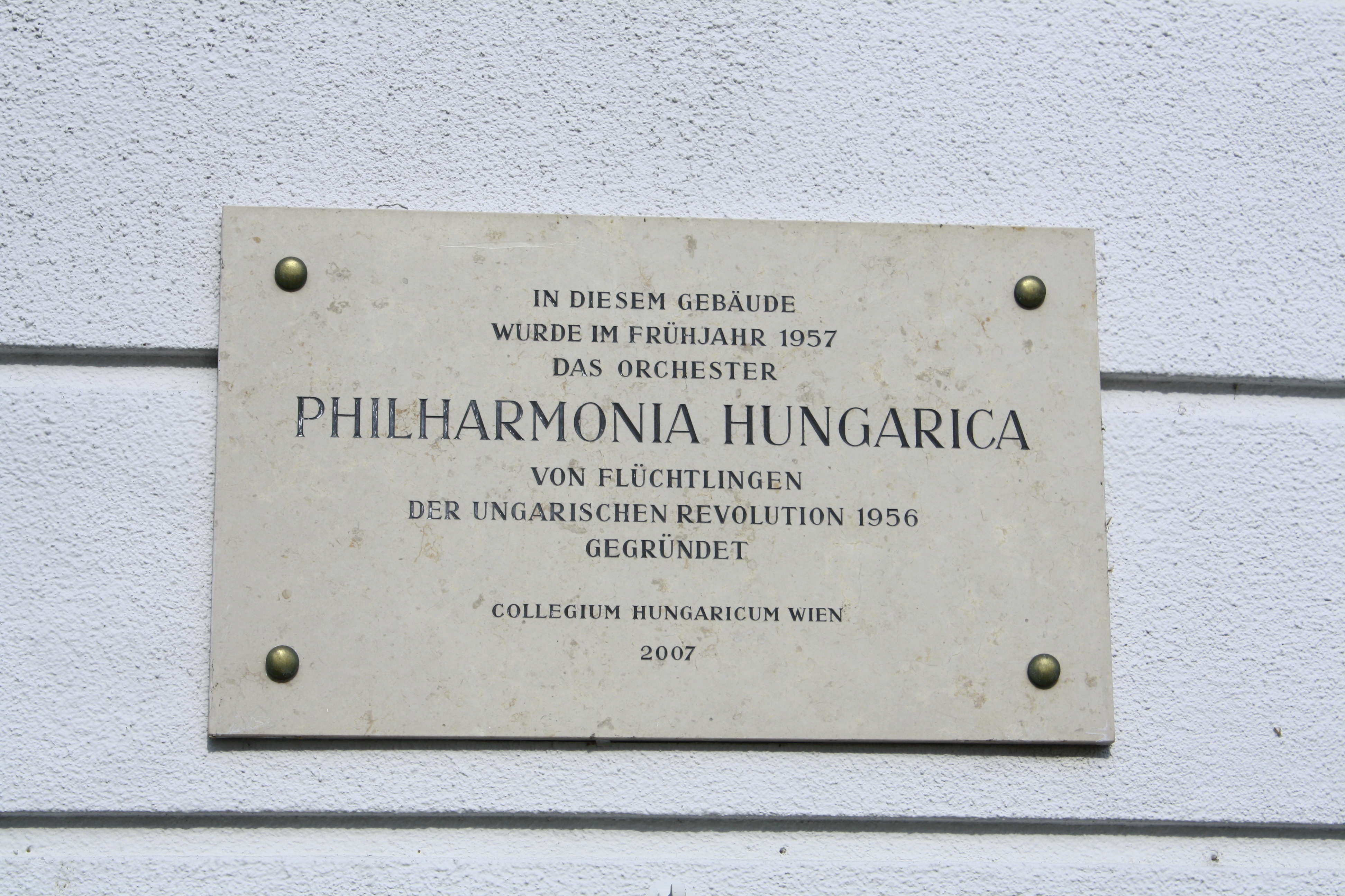 Tafel am Hotel Esplanade in Baden in Niederösterreich